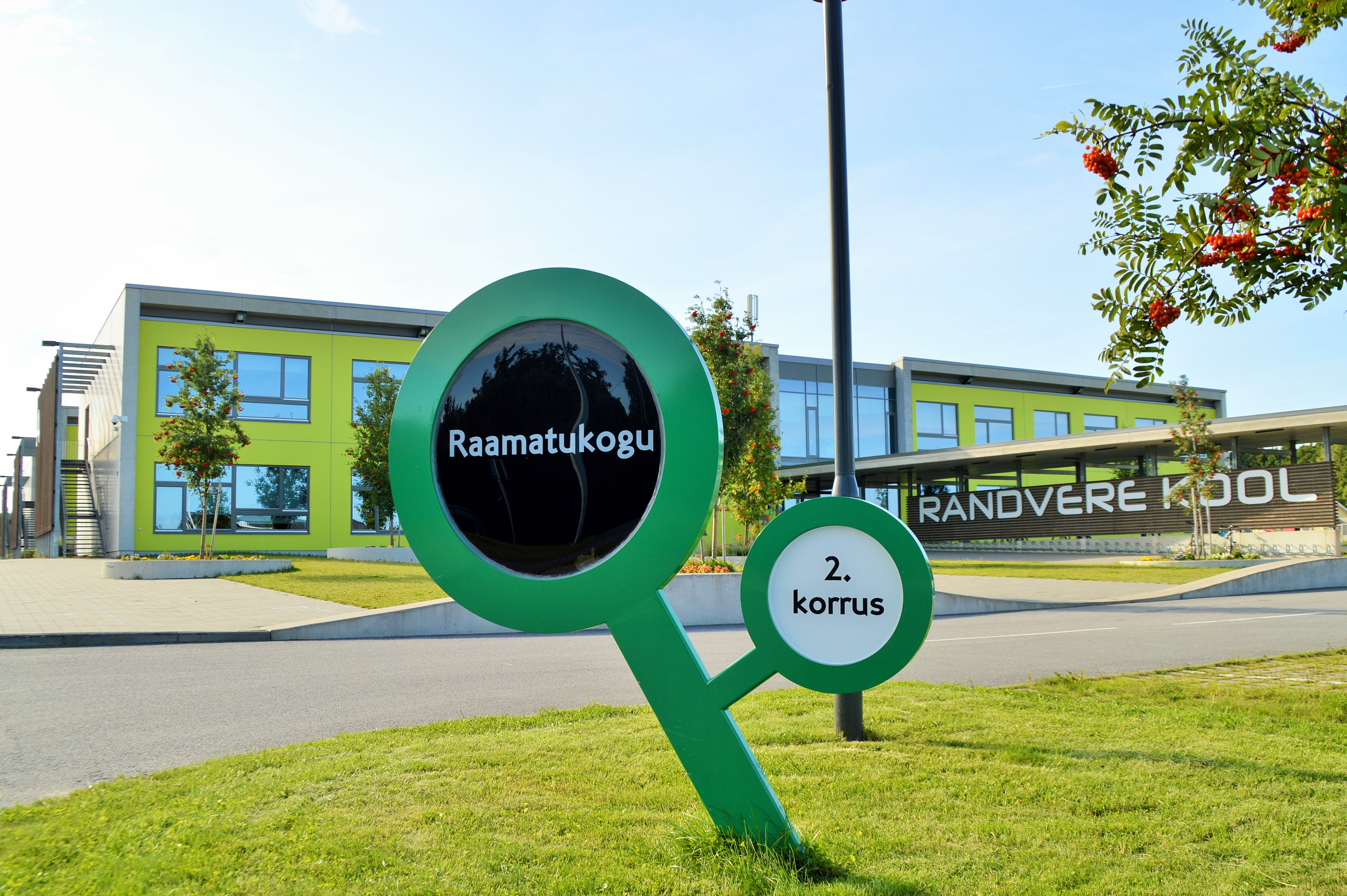 Raamatukogu asub koolimaja 2. korrusel